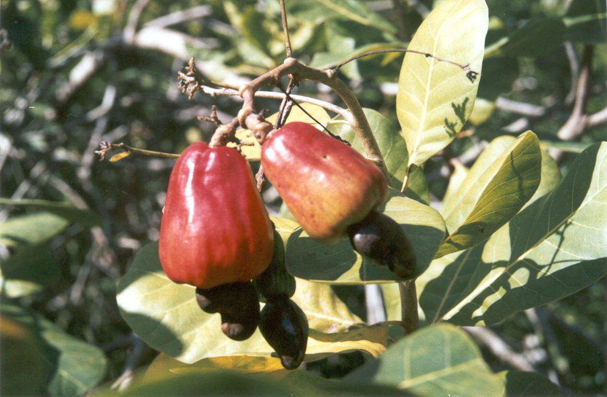 Frutos y semillas de merey Frutos maduros de merey (Anacardium occidentale) con sus semillas correspondientes. Autor: Fev. Fecha 19-08-06. Lugar: Curiepe, Estado Miranda, Venezuela.